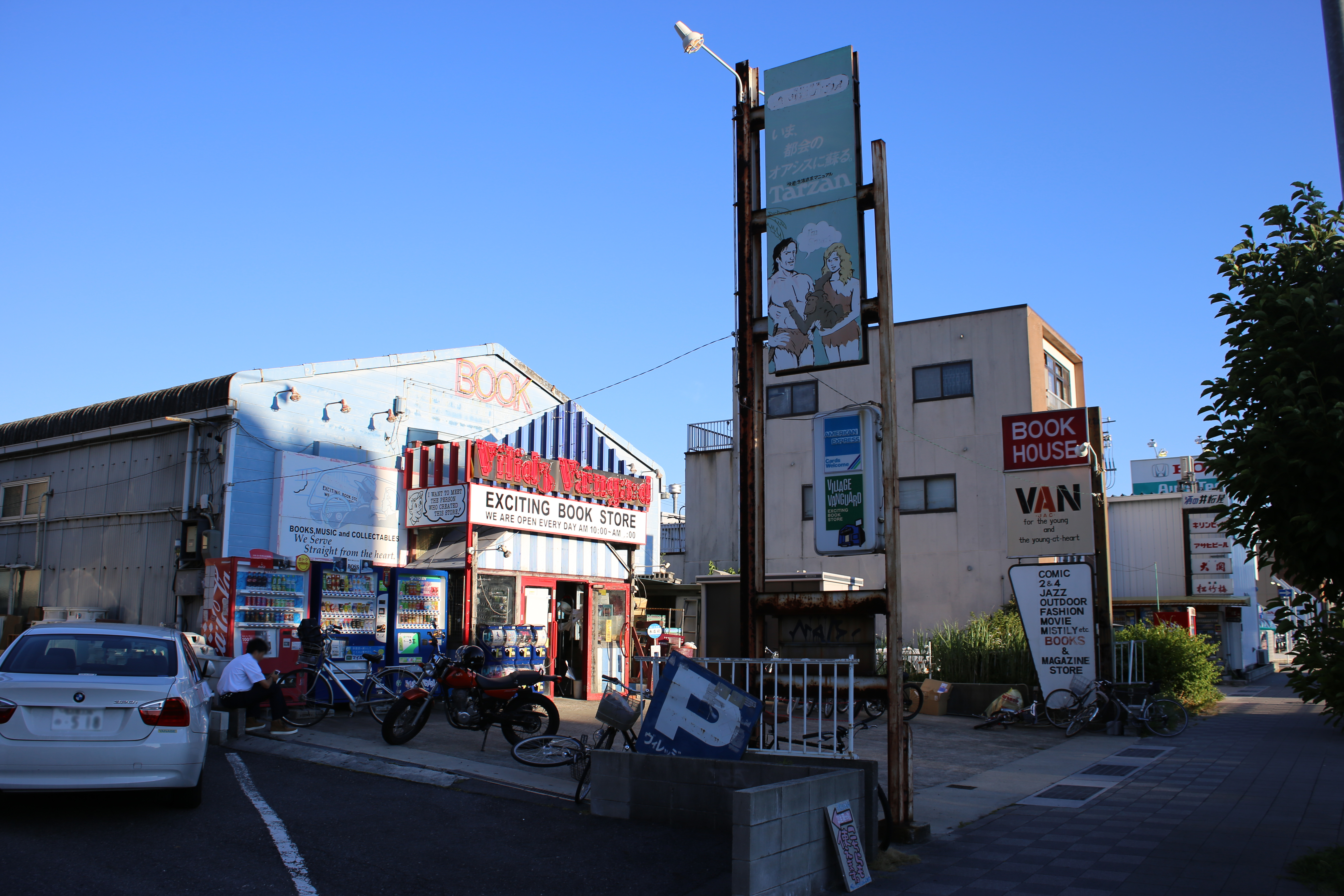 名古屋市天白区植田西のヴィレッジバンガード本店を西側公道北側より撮影。ただし、ナンバープレートにつき画像処理済。